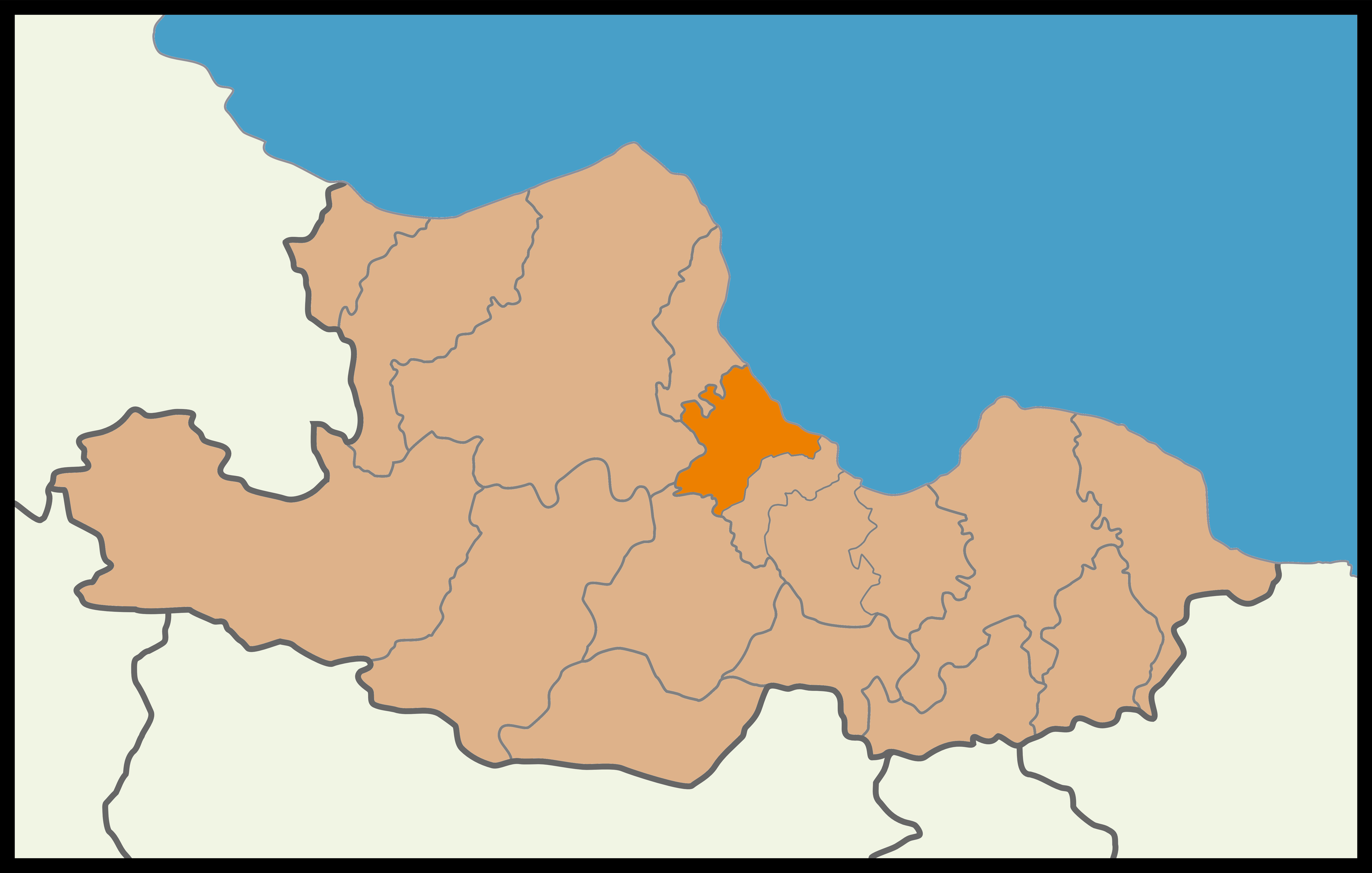 Samsun'un Atakum ilçesinin 2014 Türkiye yerel seçimleri haritası.